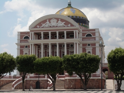 Het operagebouw in Manaus. Eigen werk, GFDL en cc-by-sa-2.5